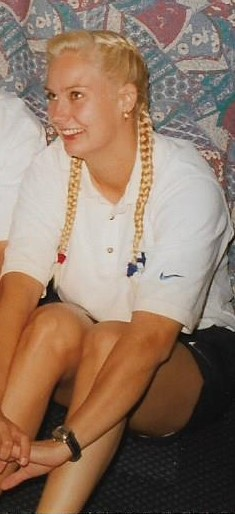 Mia Strömmer Suomen joukkueen mitalikahvitilaisuudessa yleisurheilun EM-kilpailuissa Budapestissa 23. elokuuta 1998.